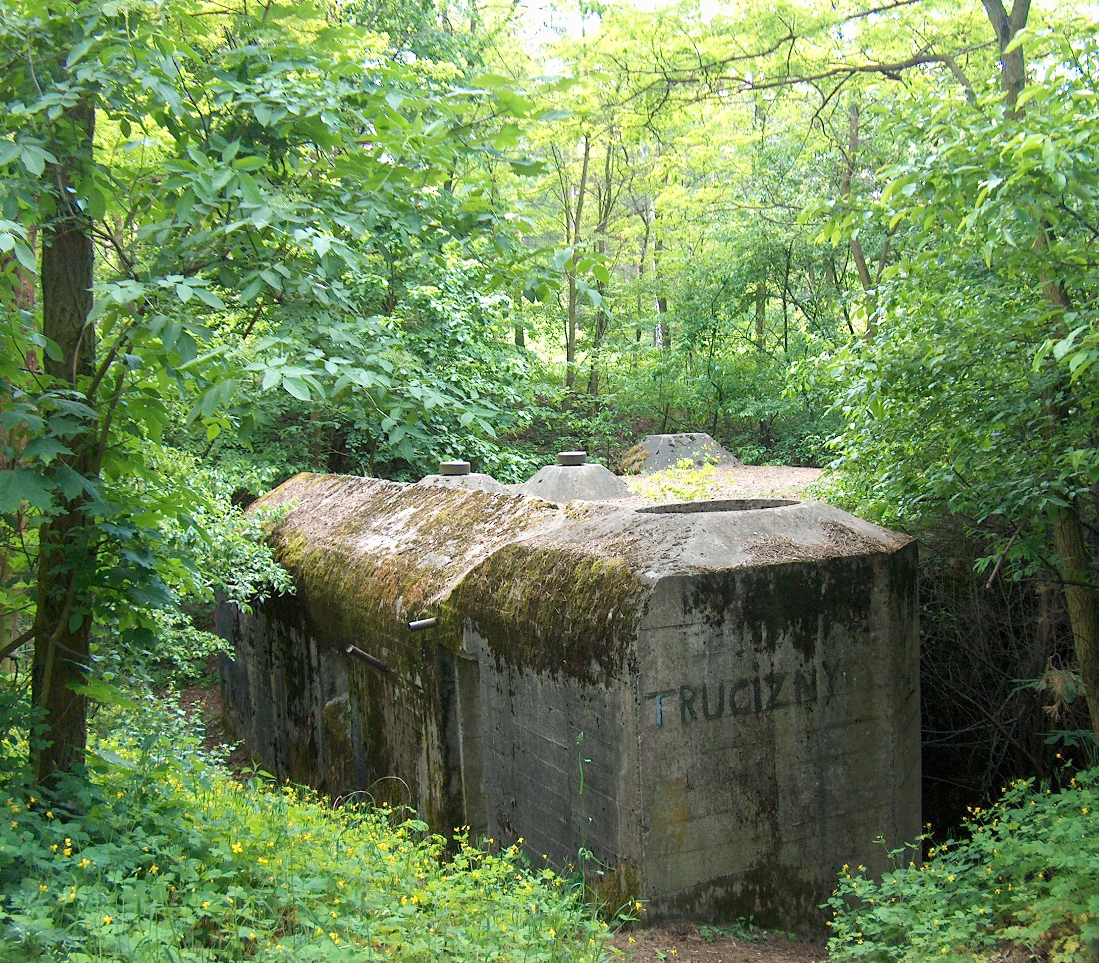 Otłoczyn - bunkier nad Tążyną. Zbudowany dla Twierdzy Toruń rok 1944. autor zdjęcia Jacek Krzyżyński Otłoczyn